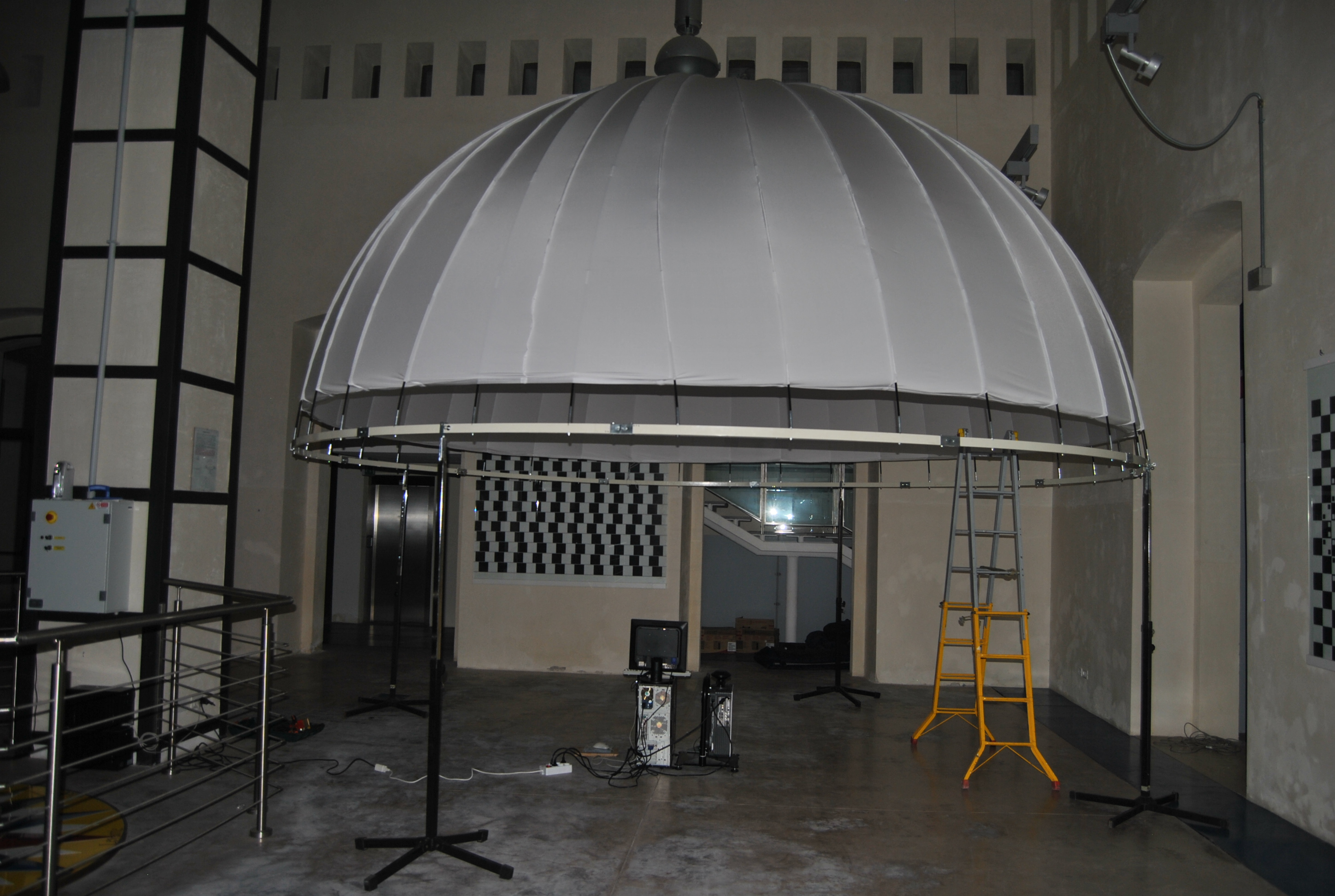 Fase di installazione del planetario della città della scienza di Catania (archivio Stelle e Ambiente).